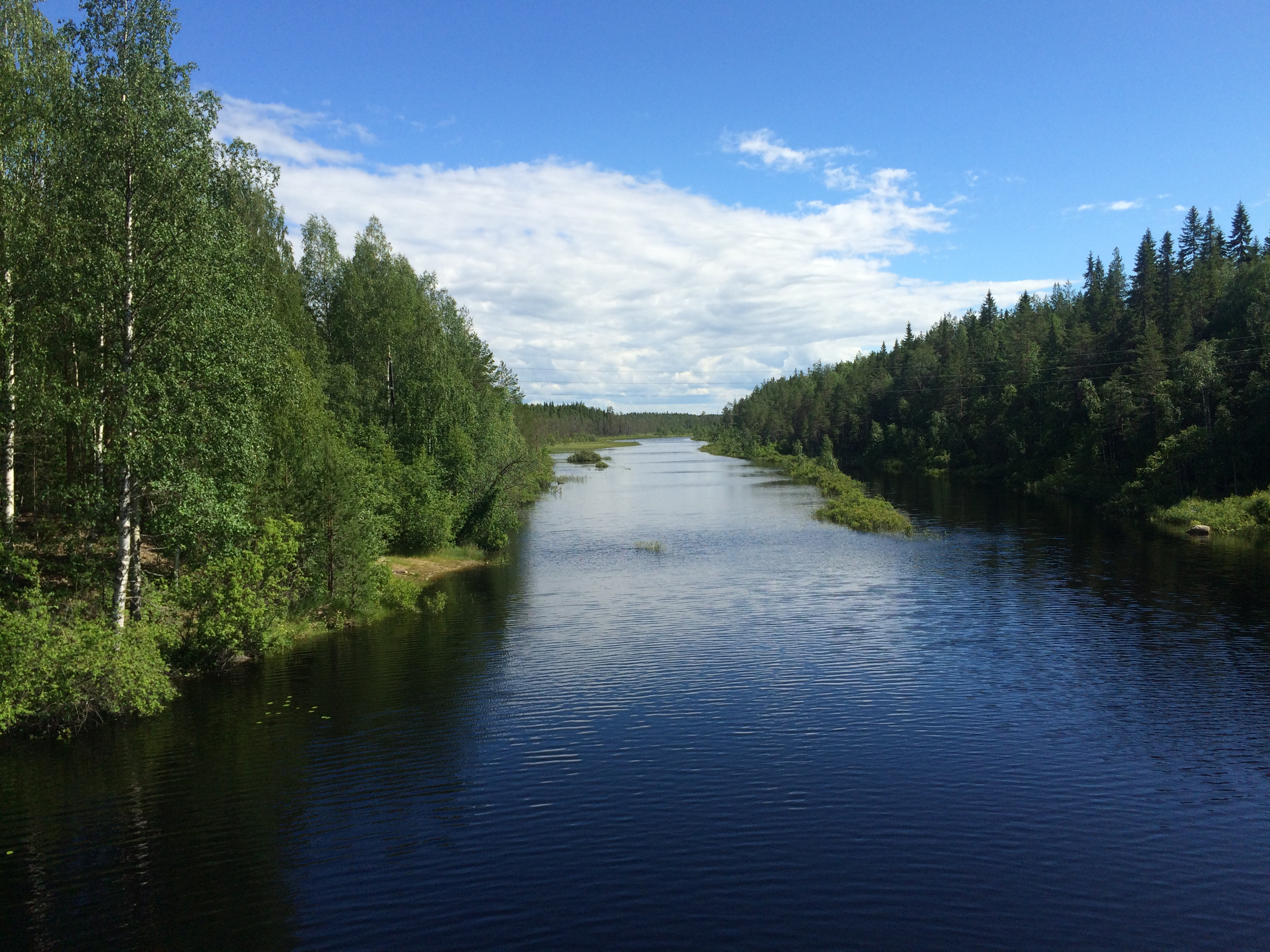 Кягма